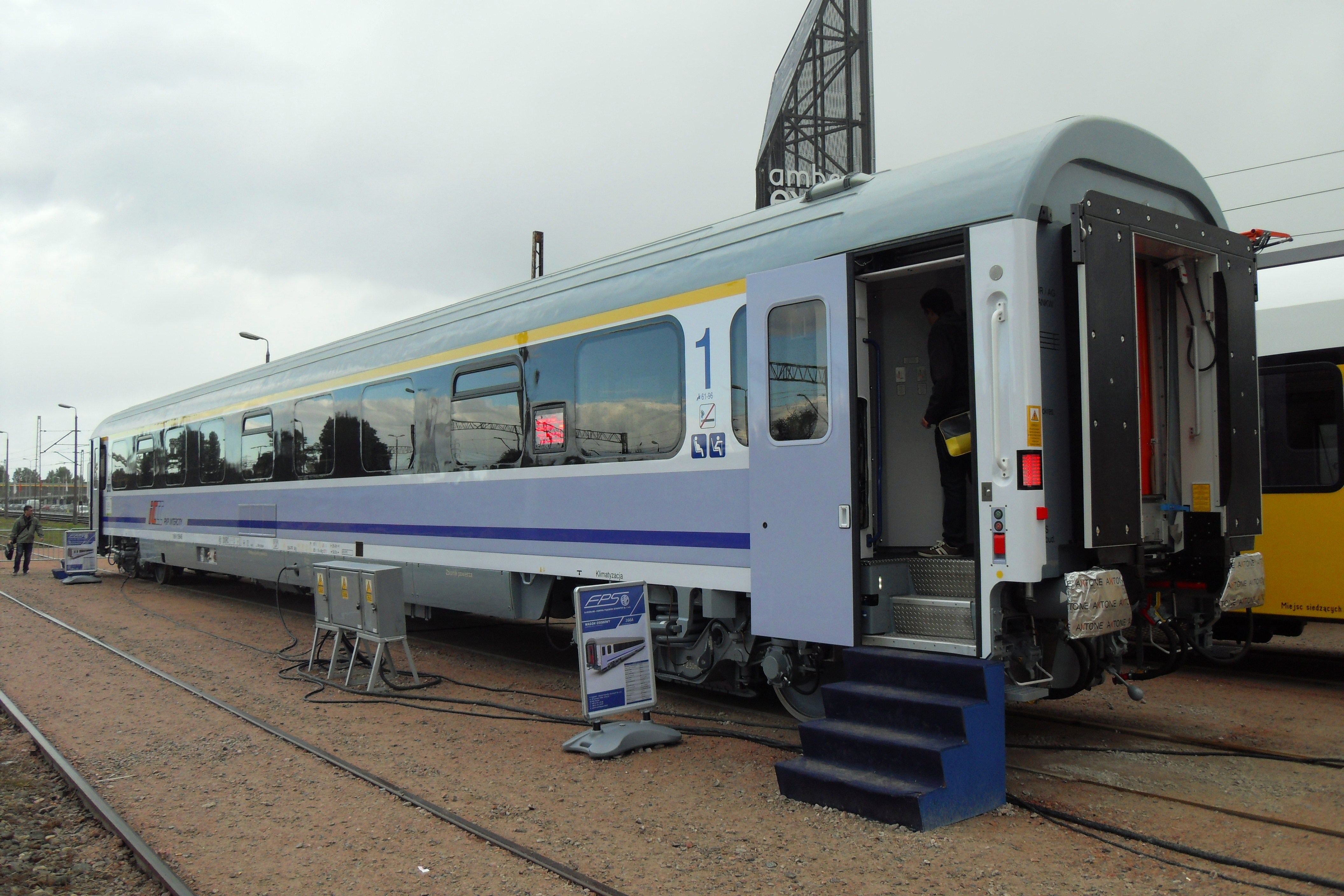 Gdańsk Letnica. TRAKO 2013, wagon 166A.